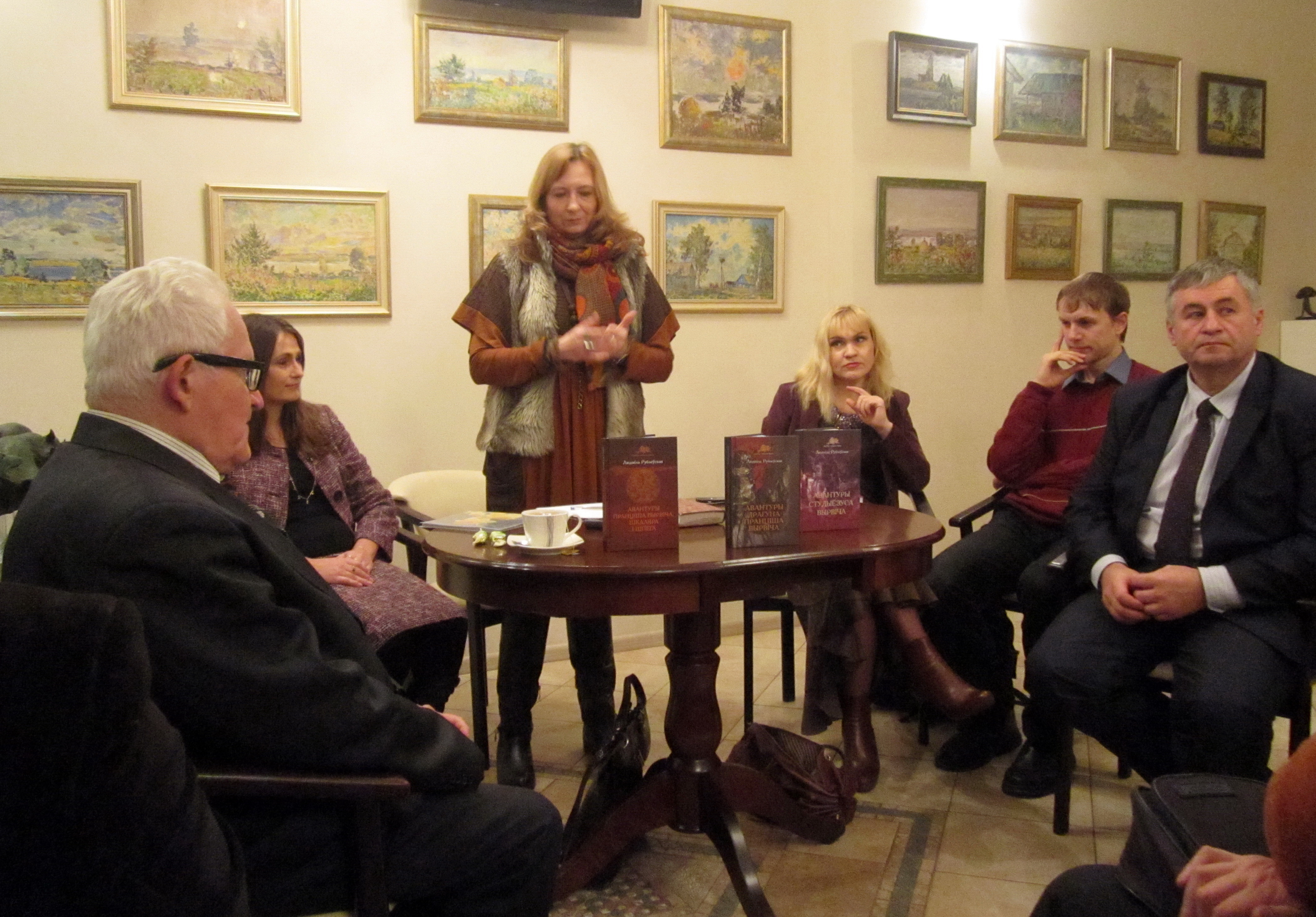 Прэзентацыя завяршальнай кнігі Людмілы Рублеўскай з трылогіі "Авантуры Пранціша Вырвіча". Злева направа: Адам Мальдзіс, Ганна Бутырчык, Людміла Рублеўская, Ганна Кісліцына, Дзяніс Марціновіч, Алесь Карлюкевіч.